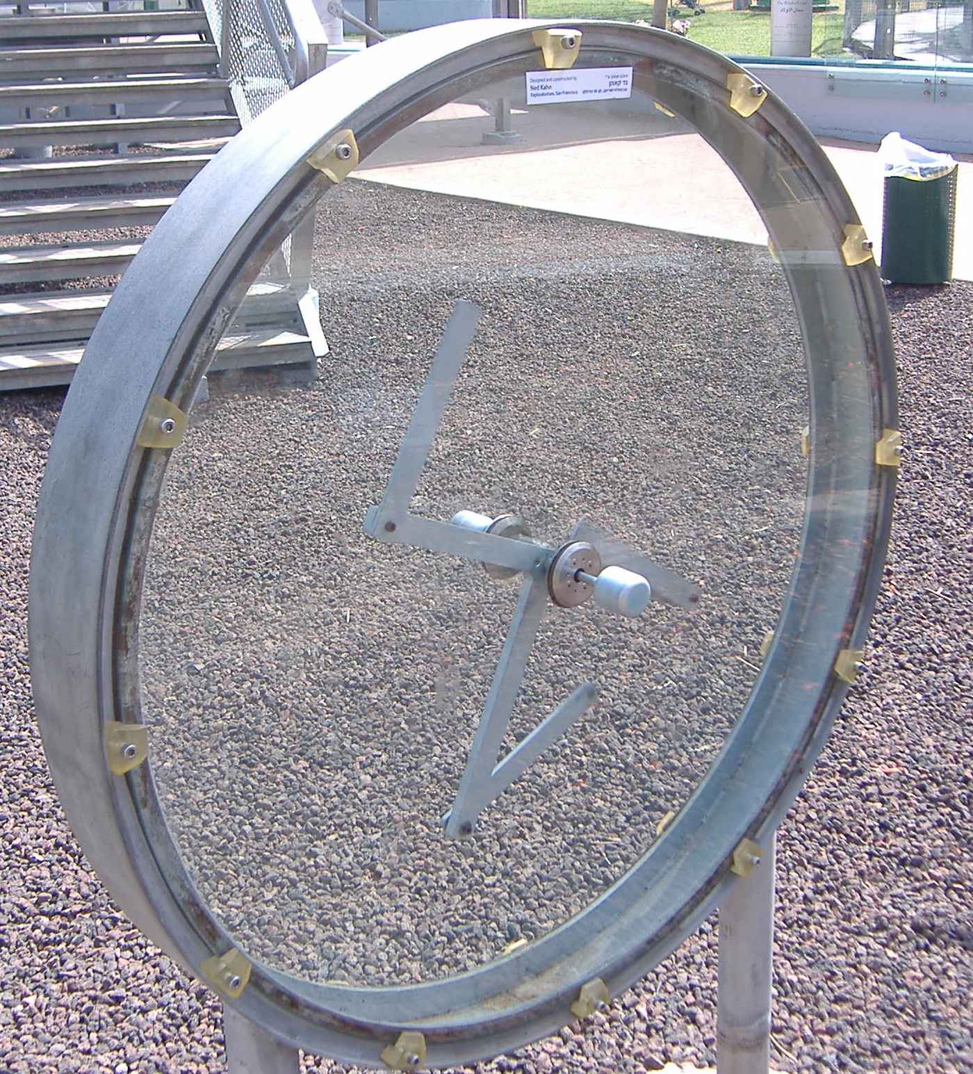 "מטוטלת כאוס" מגן המדע במכון ויצמן